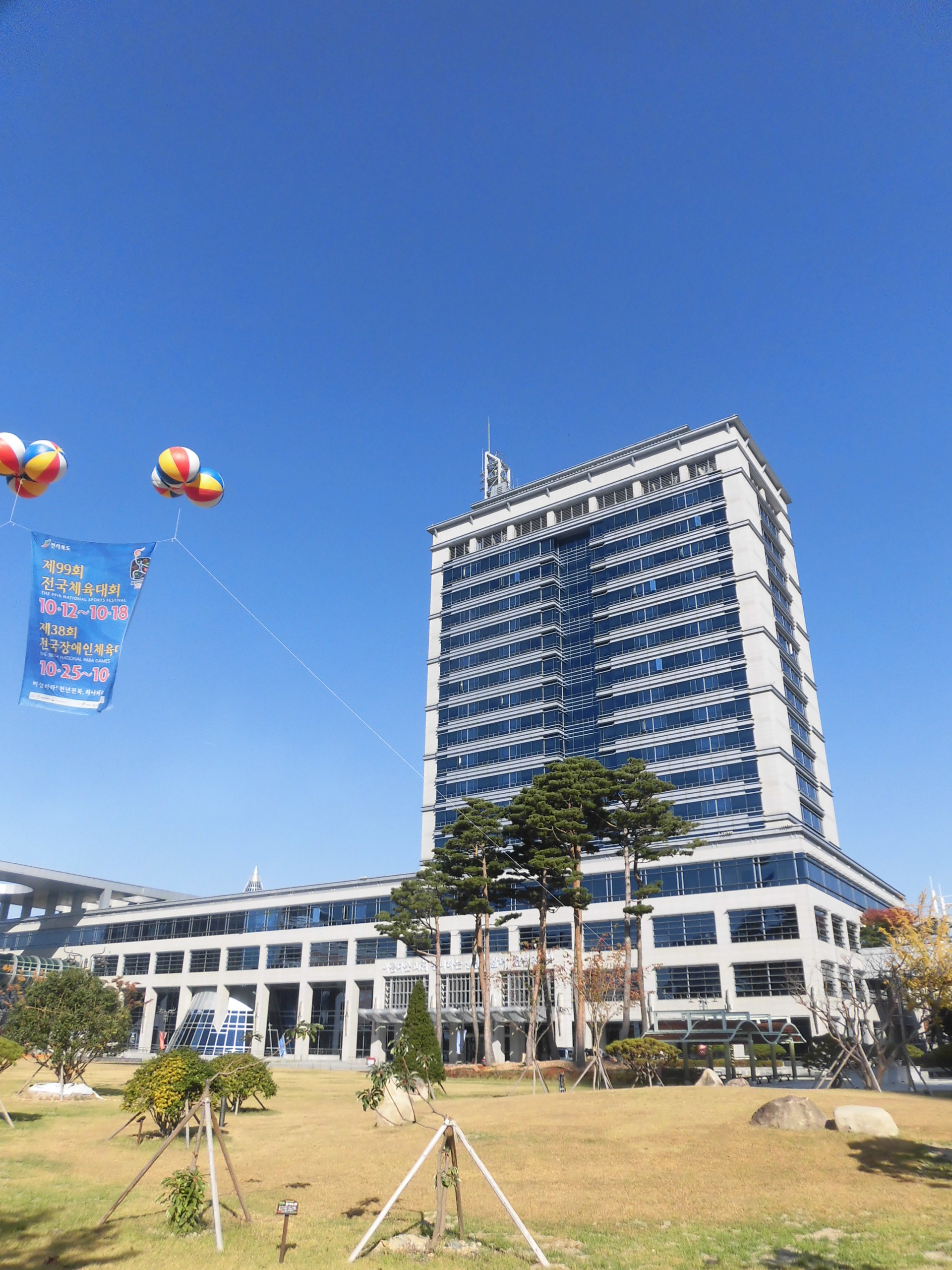 전라북도 전주시에 있는 전라북도청